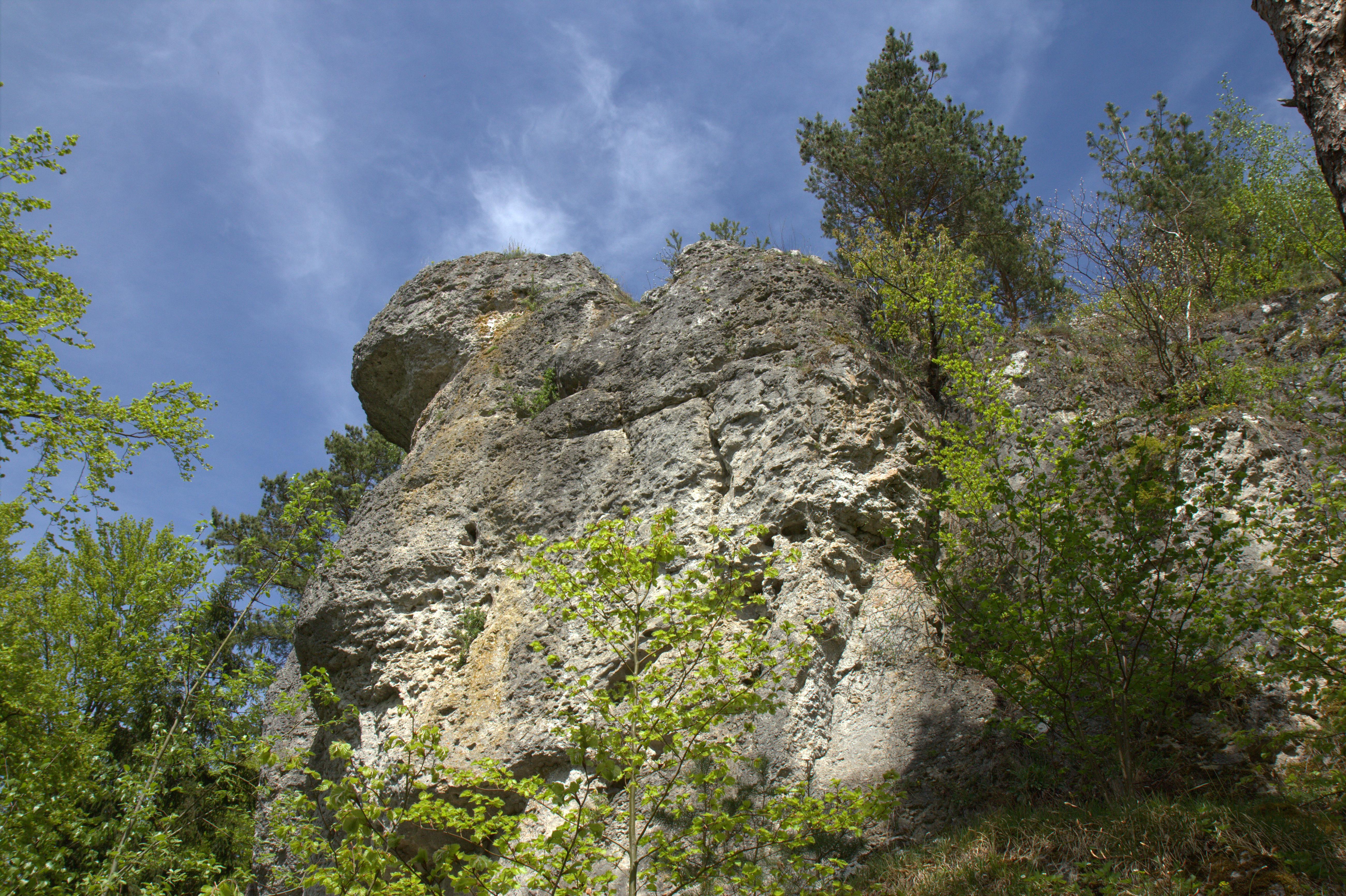 Burgstall Hartenfels - Südliche Spitze des Bergspornes